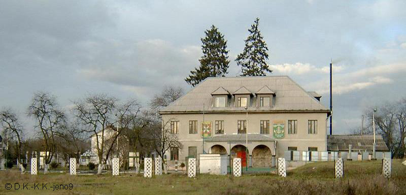 Tiszasalamoni uradalom kastélya, ma a határőrség épülete